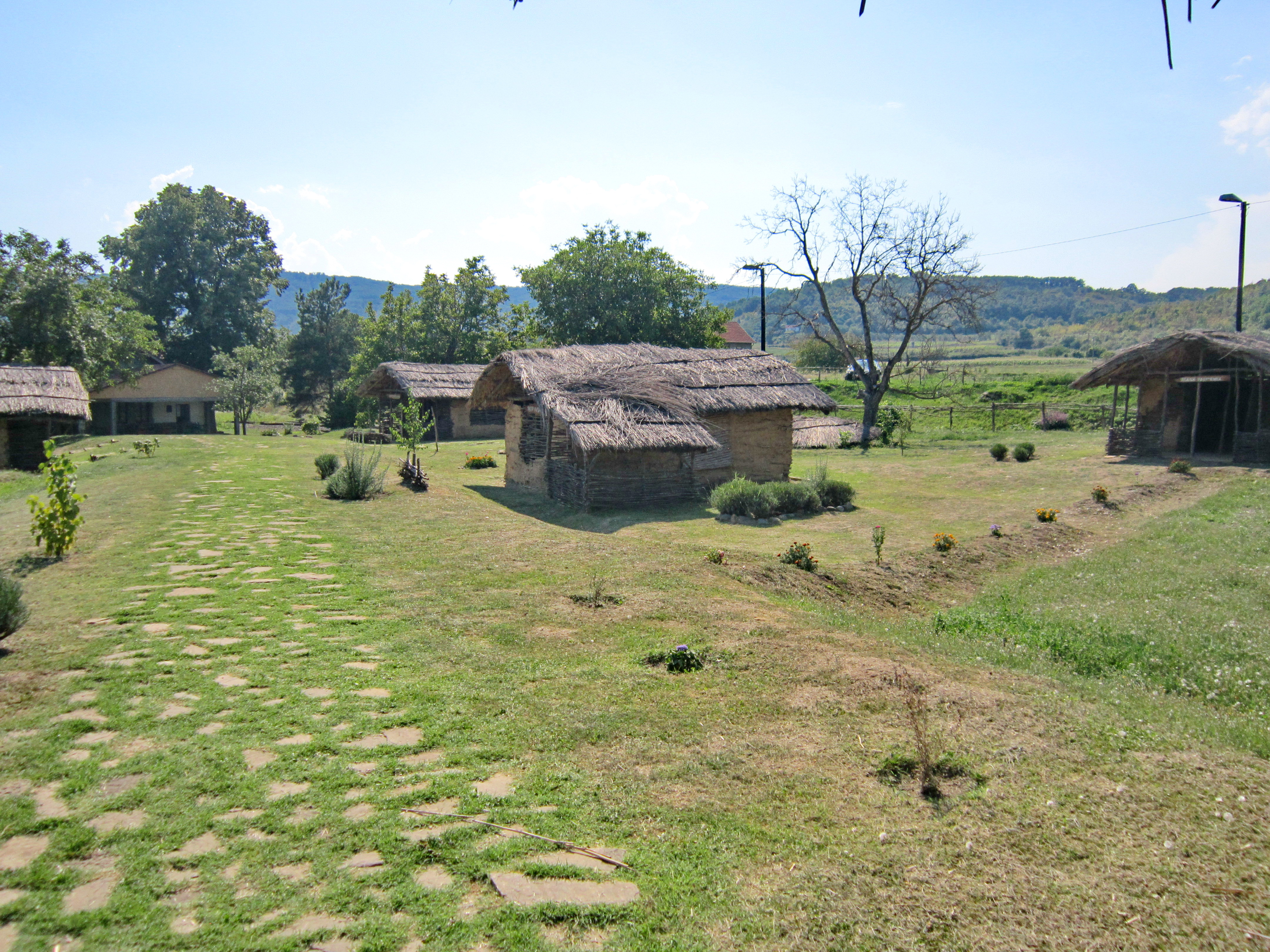 Српски (ћирилица): Археолошко налазиште Плочник